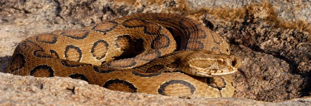 Russells Viper, Bannerghatta, India